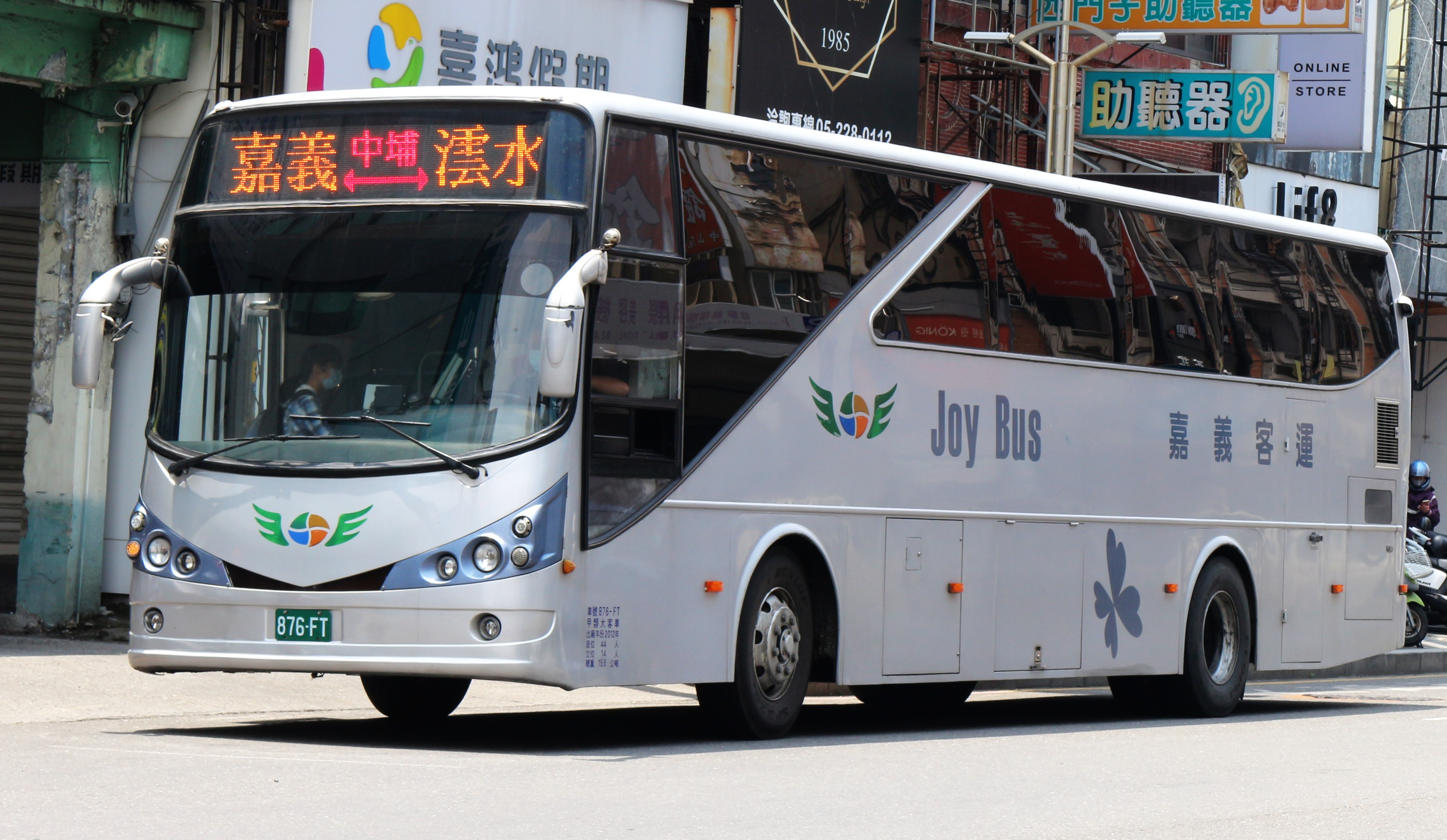 中文（台灣）: 嘉義客運2012年三菱扶桑RM11FNL大客車876-FT。